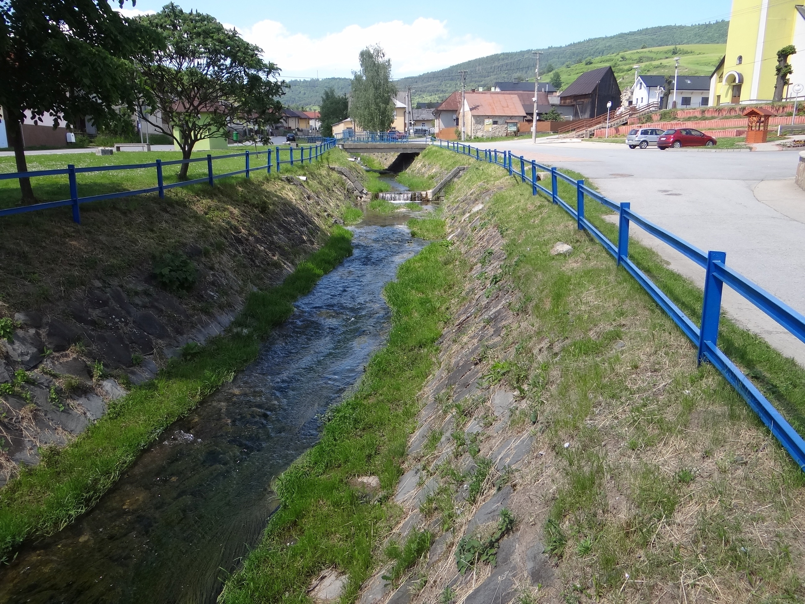 Lipiansky potok